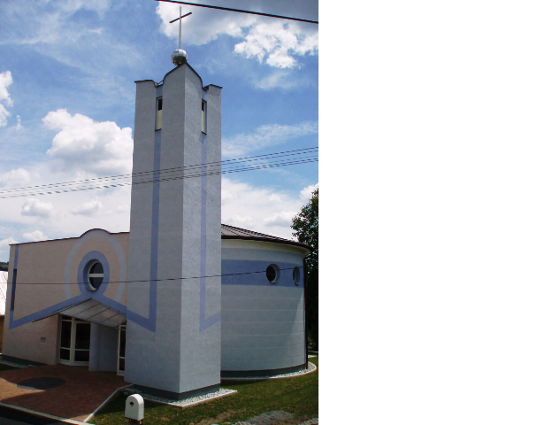 Kostol v železníku